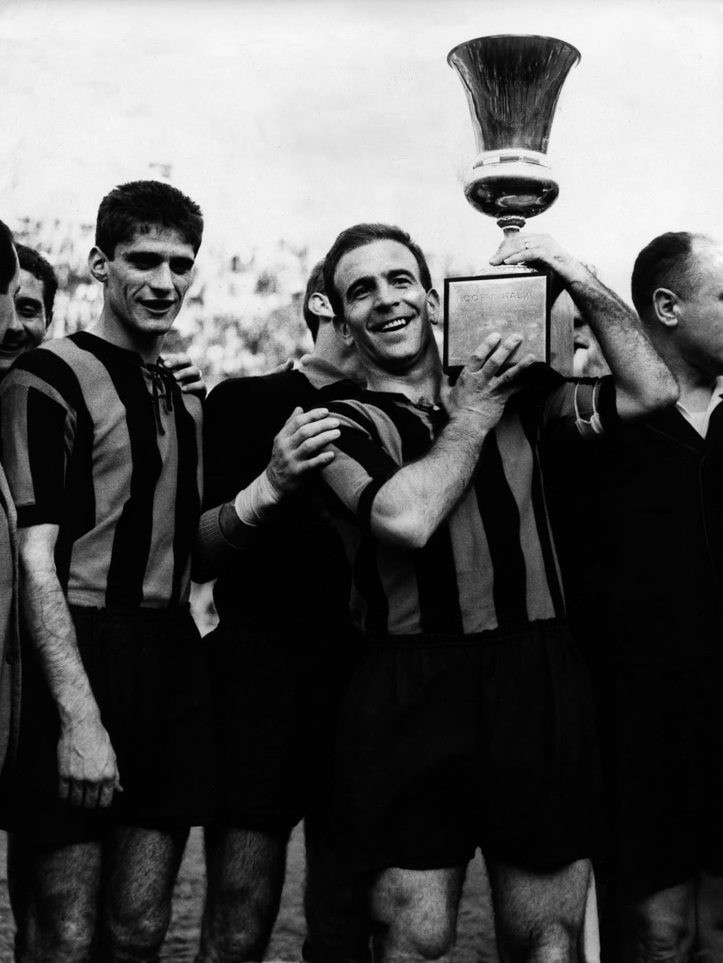 Milano, stadio San Siro, 2 giugno 1963. La festa dell'Atalanta al termine della finale di Coppa Italia 1962-63 vinta sul Torino (3-1): Angelo Domenghini (a sinistra), miglior marcatore dell'edizione con 5 gol e protagonista della finale con una tripletta, è accanto al capitano nerazzurro Piero Gardoni (a destra) intento a sollevare il trofeo.